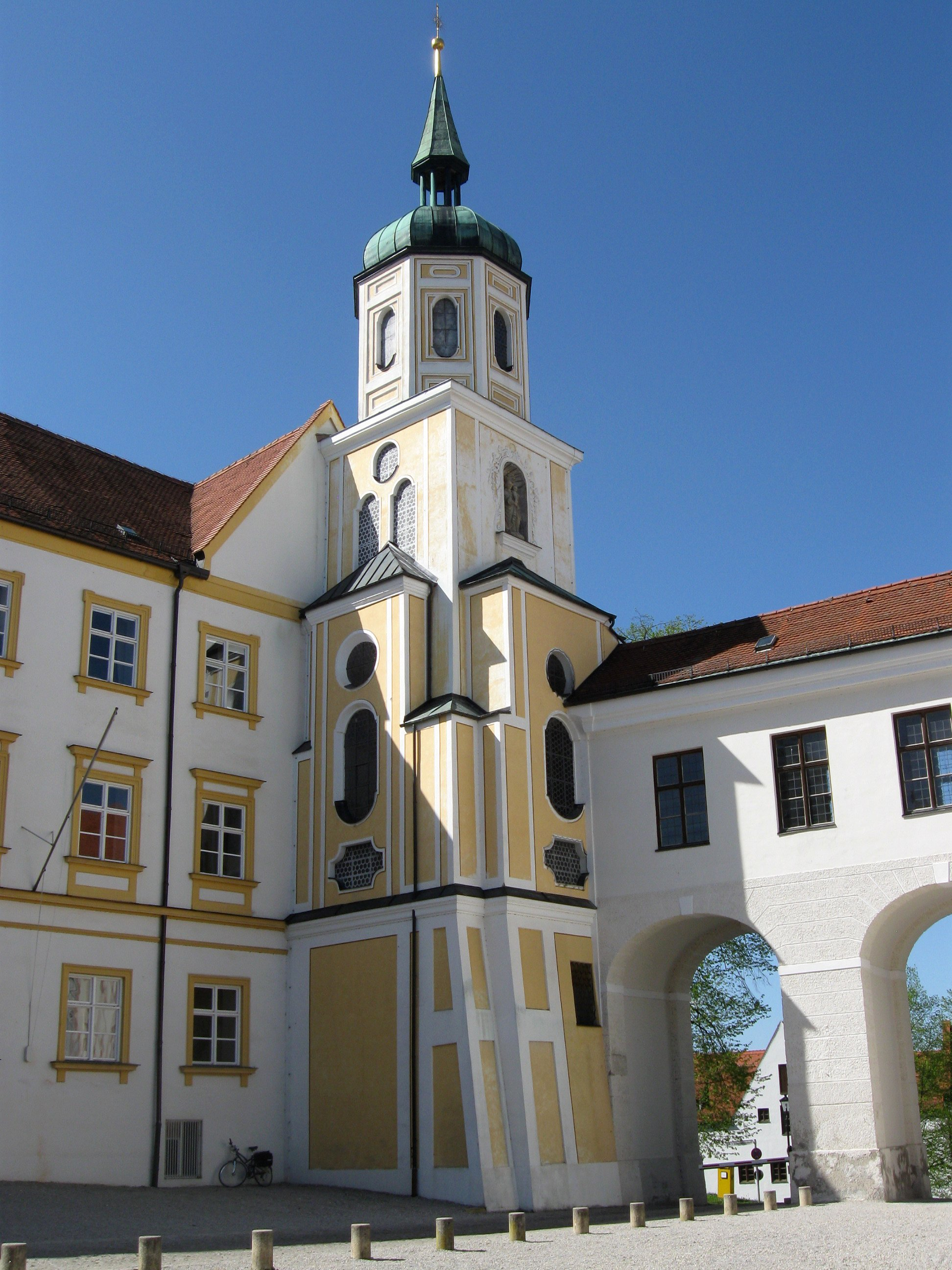 Domberg 27; ehem. Bischofsburg und fürstbischöfliche Residenz, jetzt Kardinal-Döpfner-Haus, dreigeschossige Vierflügelanlage mit Hofarkaden, Erker, Risalit und reichem Fensterschmuck, ab 1314 errichtet, Umbau zum Renaissance-Schloss ab 1519 durch Stephan Rottaler, 1607-22 umgebaut, 1617-21 Hauskapelle im Nordostturm eingerichtet und 1878 verändert; mit Ausstattung; Verbindungsgang zwischen Residenz und Dom durch St. Benedikt hindurch, sog. Fürstengang, errichtet wohl von Antonio Riva, 1682; Belvedere 1682; Gitter an der Terrasse vor dem Südflügel in barockisierenden Formen, bez. 1913.